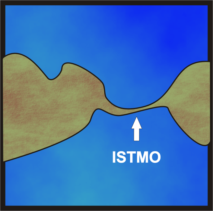 Istmo (geografia)